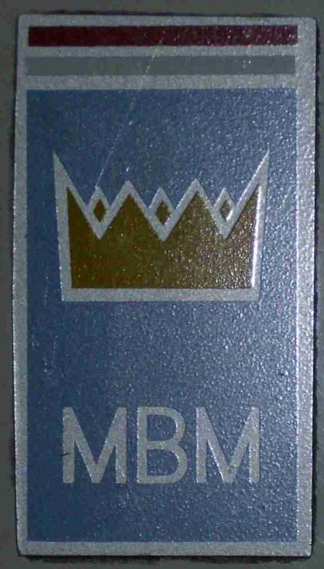 Emblem MBM